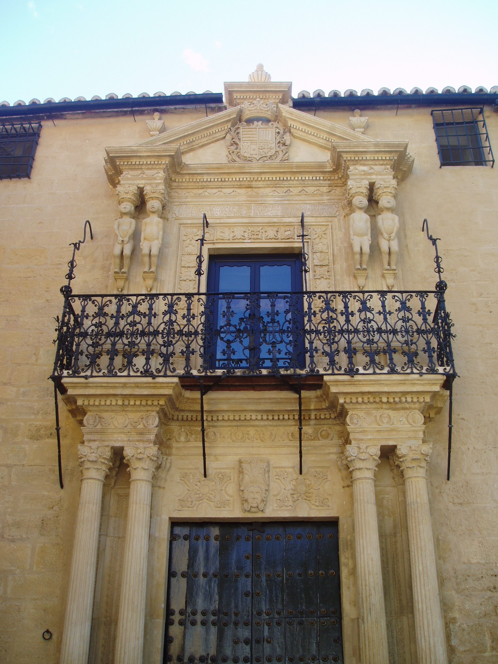 Palacio de los Marqueses de Salvatierra en Ronda, Andalucía, España.